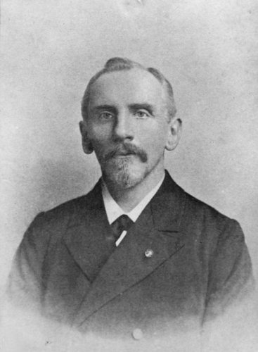 Christiaan Snouck Hurgronje (1857-1936)